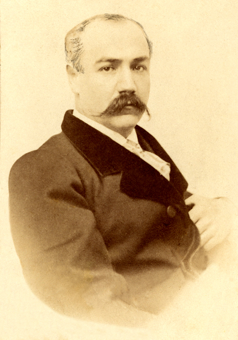 Retrato de Benjamín Vicuña Mackenna (* Santiago, 25 de agosto de 1831 - † Santa Rosa de Colmo, 25 de enero de 1886) fue un destacado político e historiador chileno.